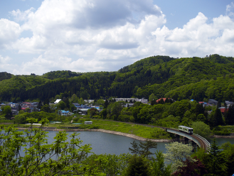 local train